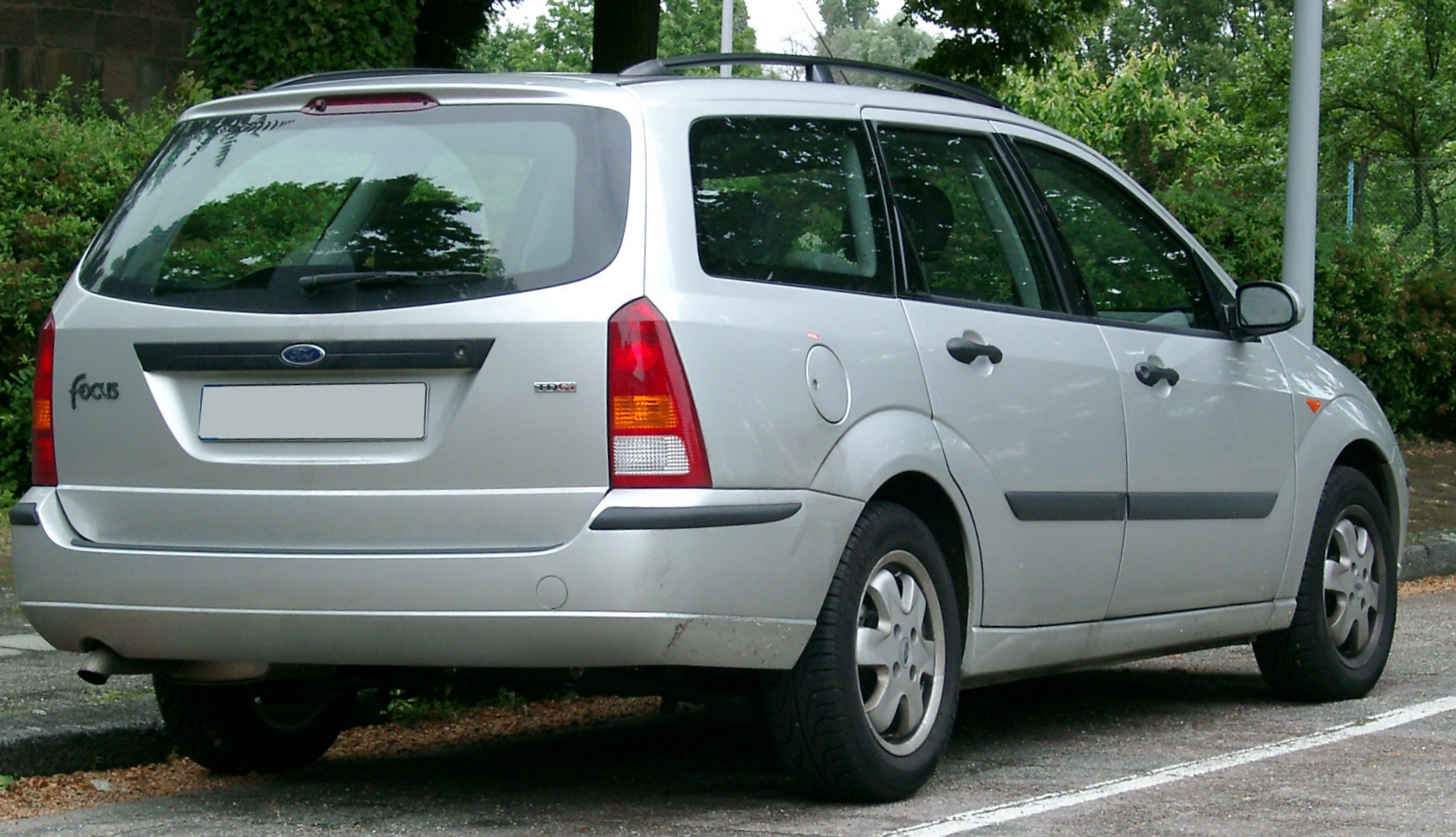 Ford Focus tdci